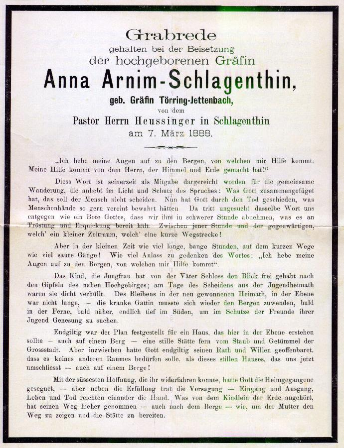 Grabrede für Gräfin Anna Arnim-Schlagenthin, geborene Gräfin Türring-Jettenbach, gehalten von Pastor Heinrich August Heußinger am 7. März 1888 in Schlagenthin.